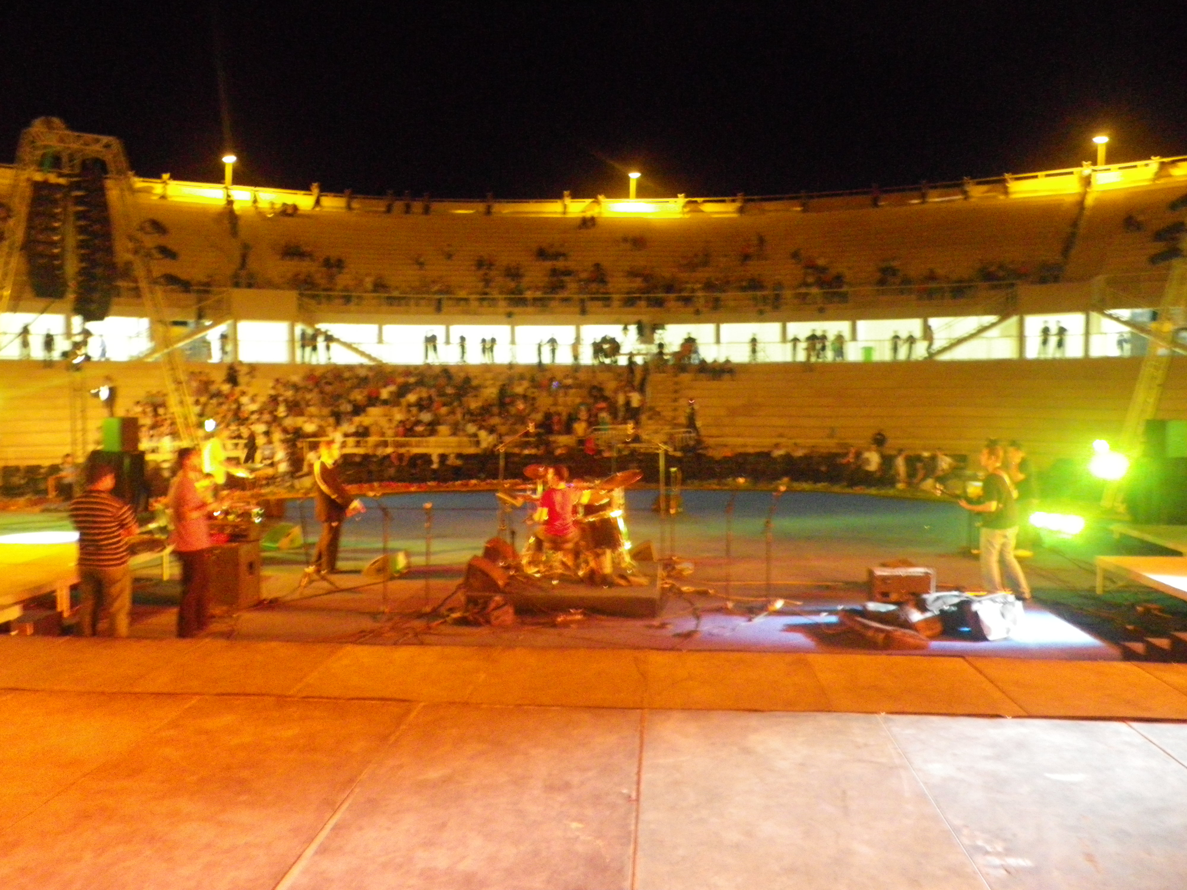 Répétitions sur la nouvelle scène du Festival de Timgad en Algérie.